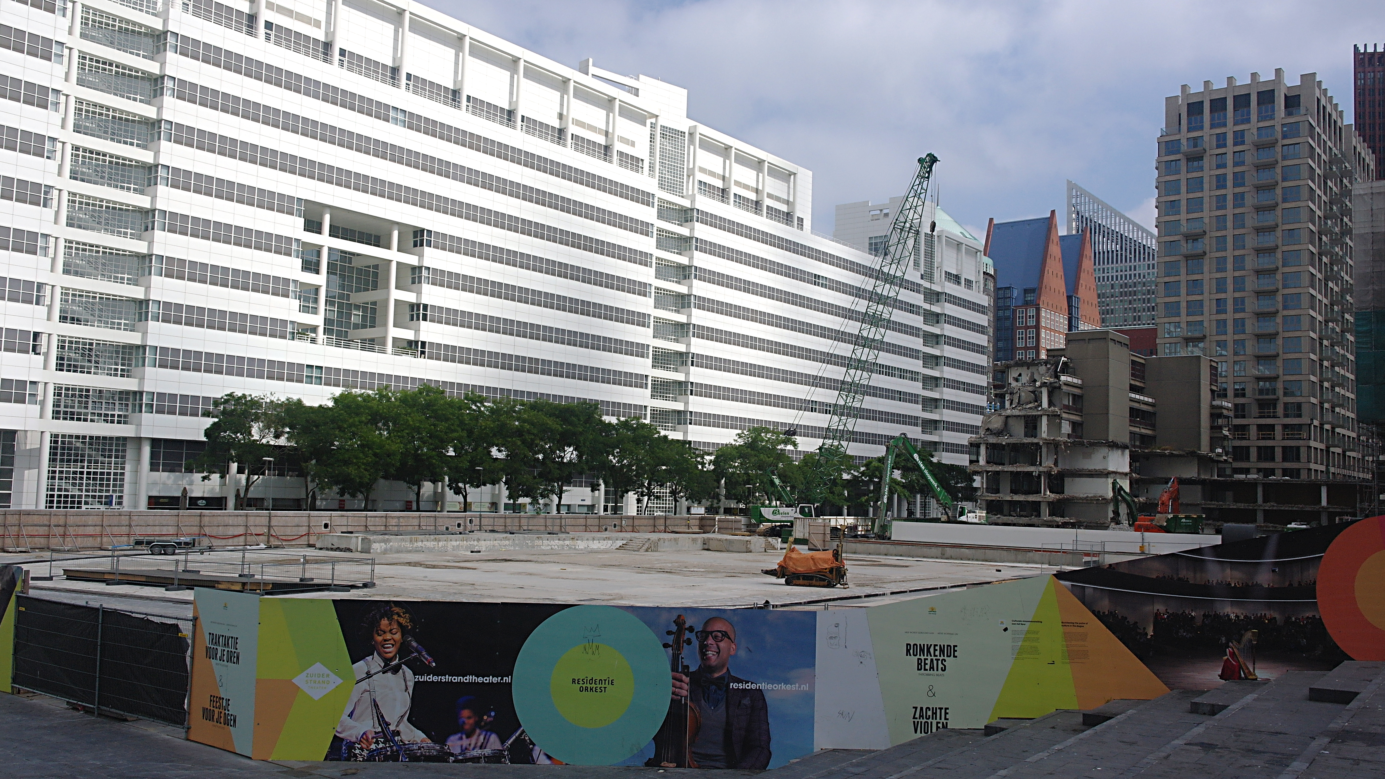 Plaats van de Dr. Anton Philipszaal na de sloop; ook met het belendende Ministerie van Justitie is het bijna gedaan.